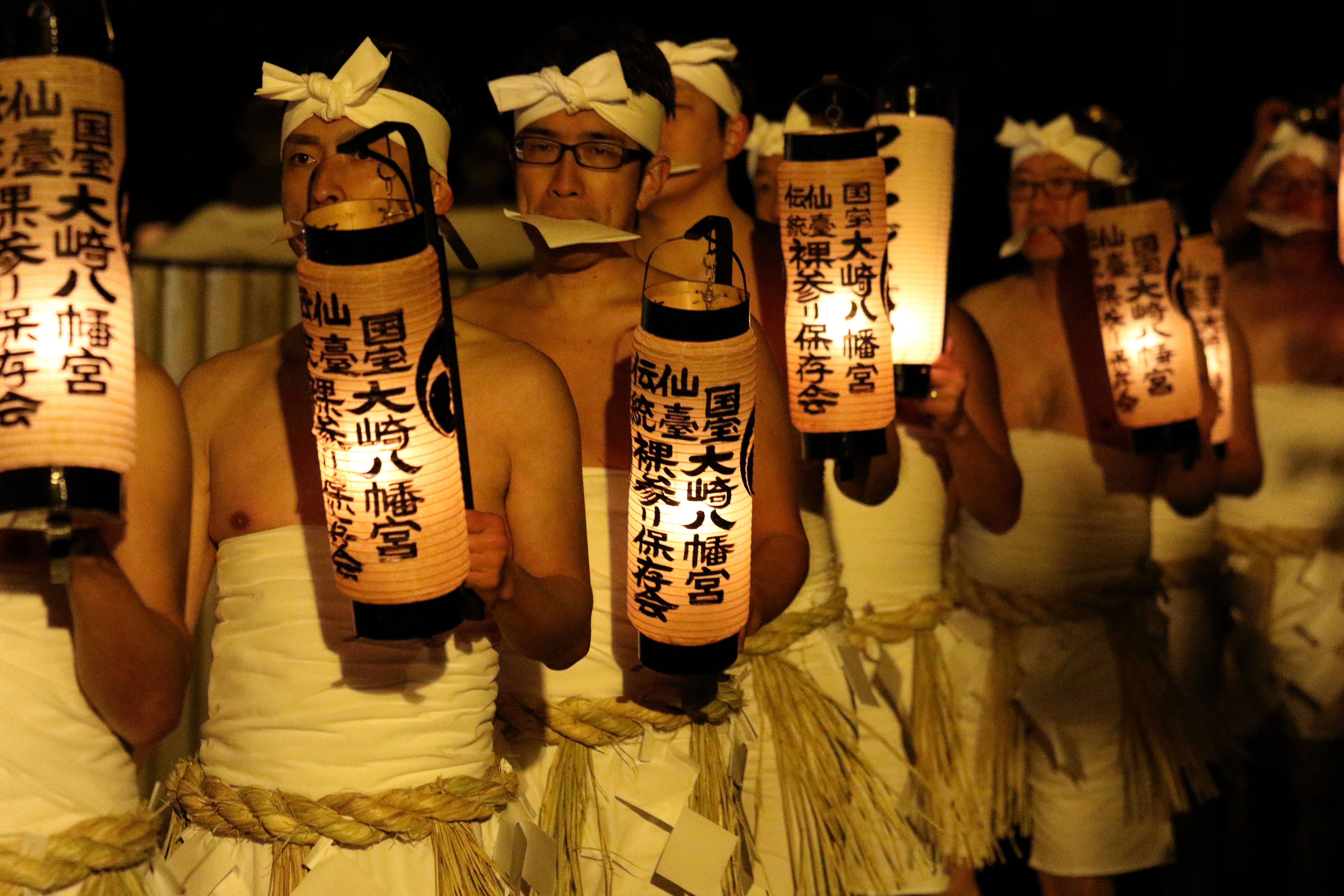 裸参り 仙台に伝わる大崎八幡宮松焚祭の裸参り